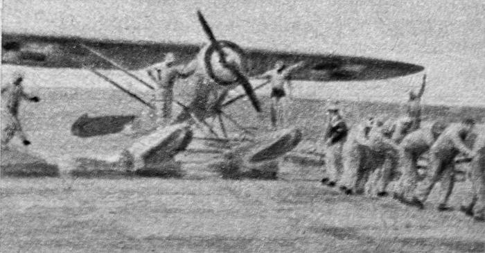 Lublin R-13 zahangarowanie.